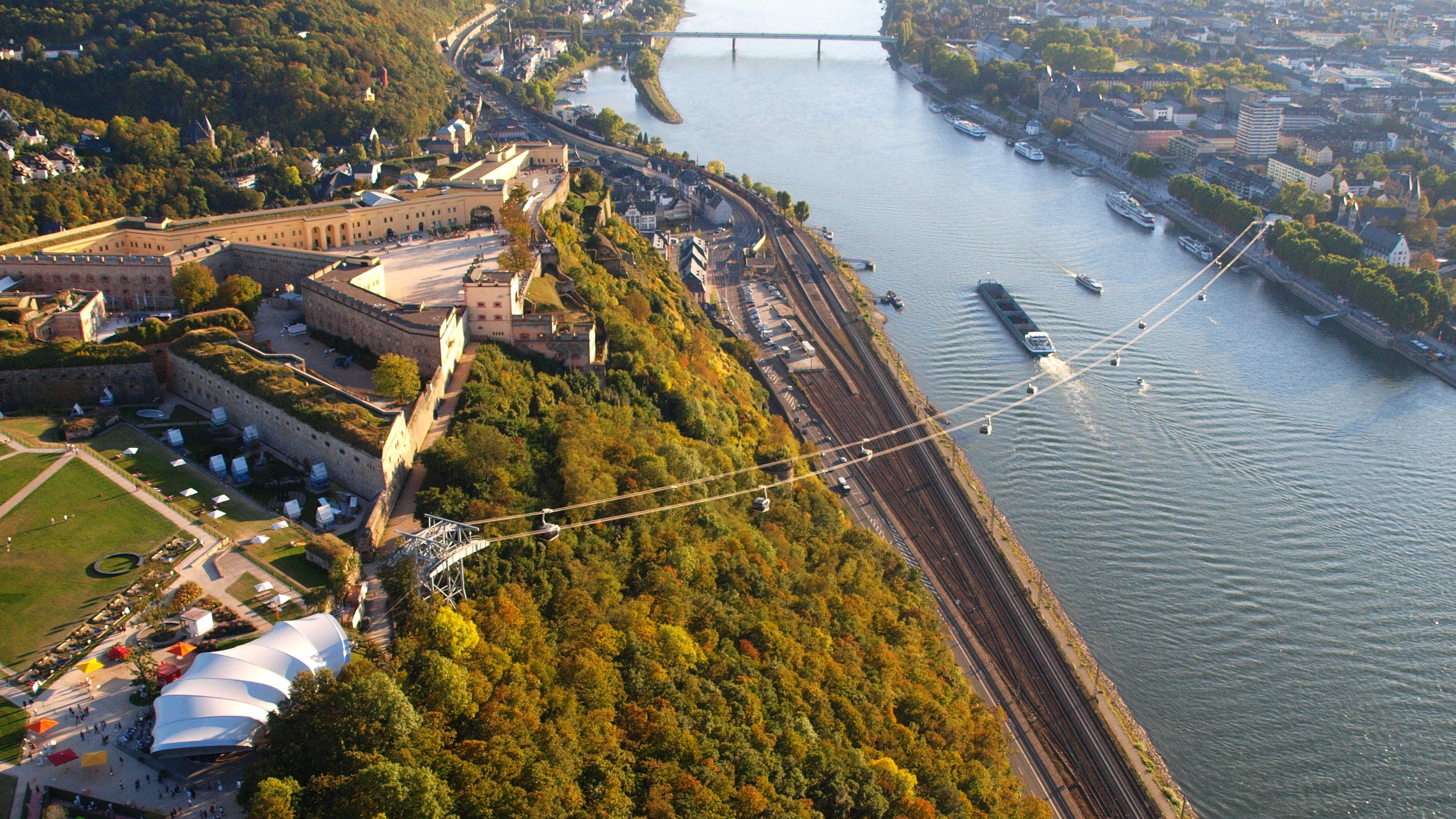 Rheinseilbahn, Koblenz: Luftaufnahme